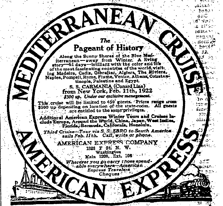 Mediterranean Cruise Реклама средиземноморских круизов на лайнерах